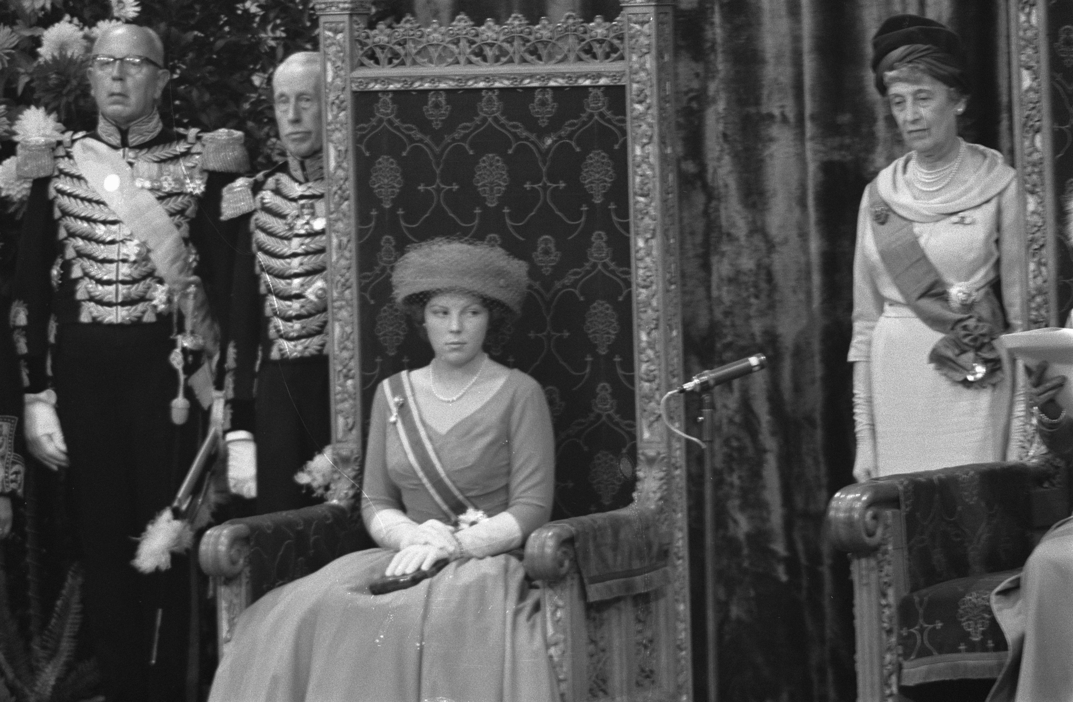 Collectie / Archief : Fotocollectie Anefo Reportage / Serie : [ onbekend ] Beschrijving : Prinses Beatrix tijdens uitspreken troonrede Datum : 20 september 1960 Locatie : Den Haag, Zuid-Holland Trefwoorden : TROONREDES, koninginnen, uitspraken Persoonsnaam : Beatrix, prinses Fotograaf : Rossem, Wim van / Anefo Auteursrechthebbende : Nationaal Archief Materiaalsoort : Negatief (zwart/wit) Nummer archiefinventaris : bekijk toegang 2.24.01.05 Bestanddeelnummer : 911-6107